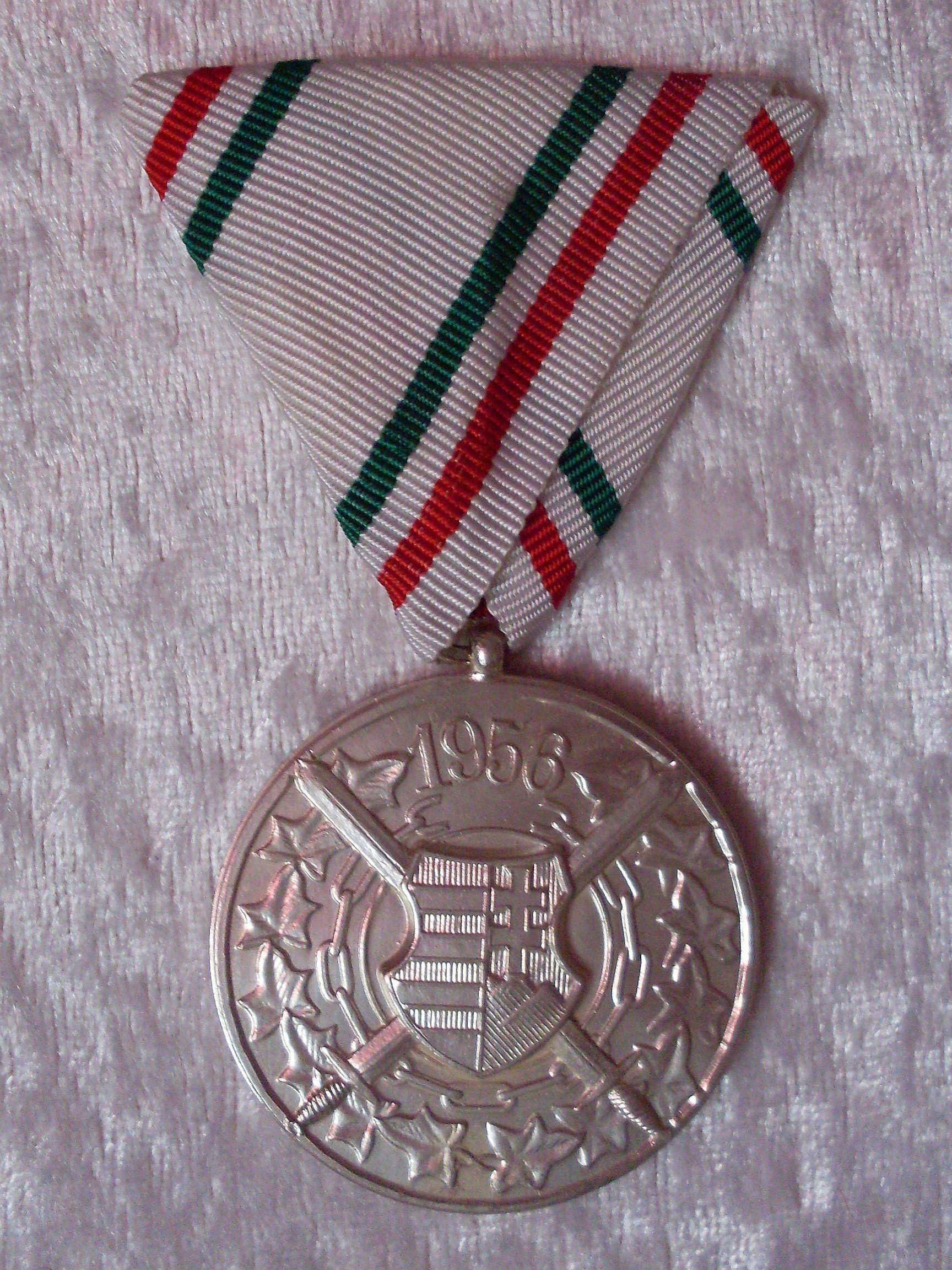 Medaille Ungarischer Volksaufstand